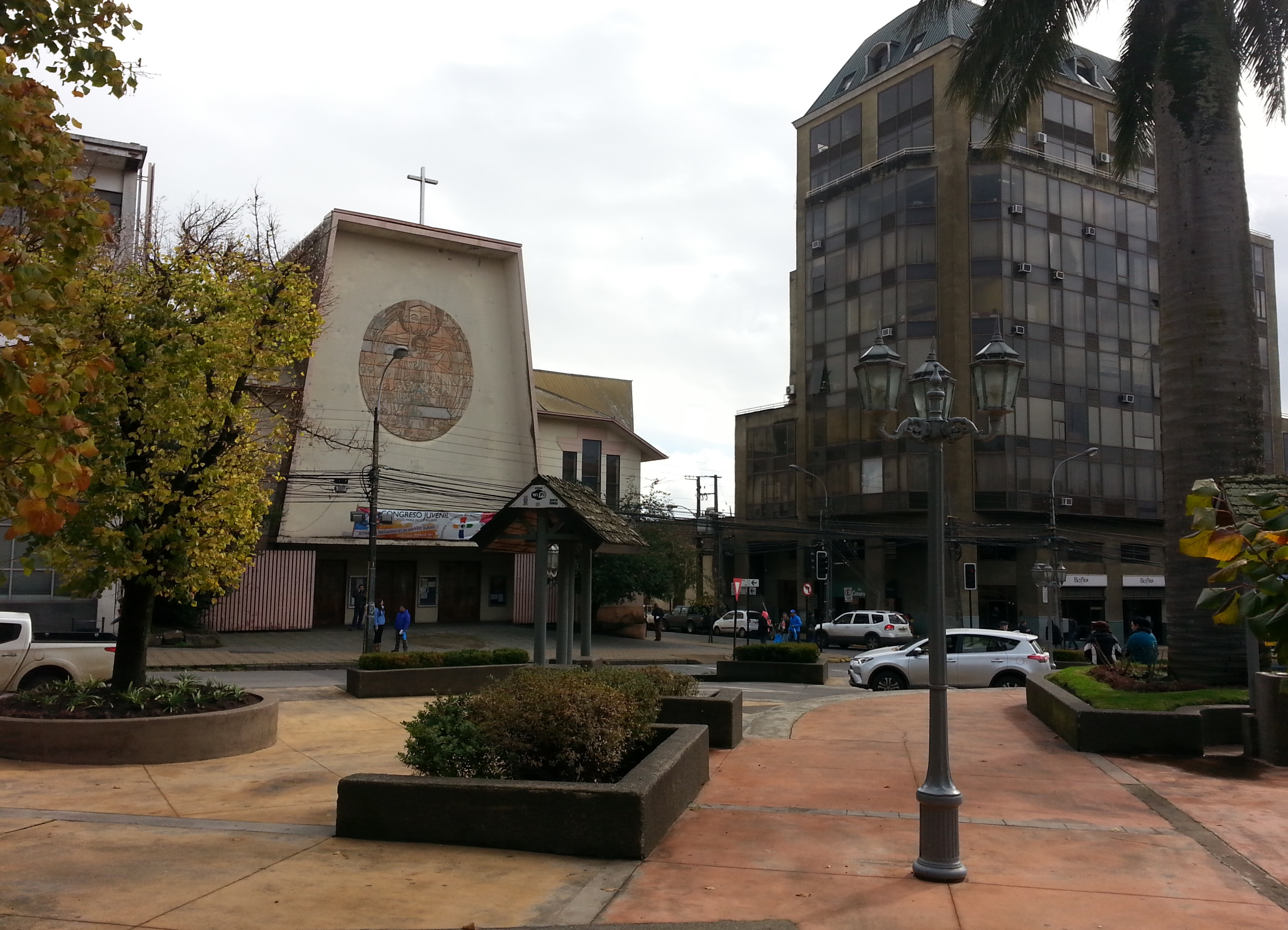 Catedral y Edificio Obispal desde la Plaza de Armas de Los Ángeles, Chile.